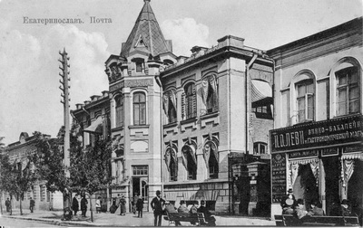 Головпоштамт у Дніпрі, історичне фото.